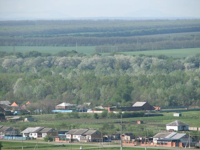 Аул Коноковский